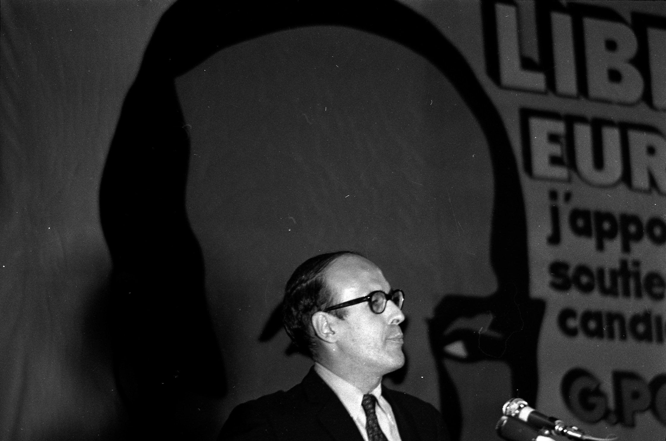 Pas de lieu. Le 20 Mai 1969. Vue de Valéry Giscard d'Estaing lors d'un discours dans une salle toulousaine.